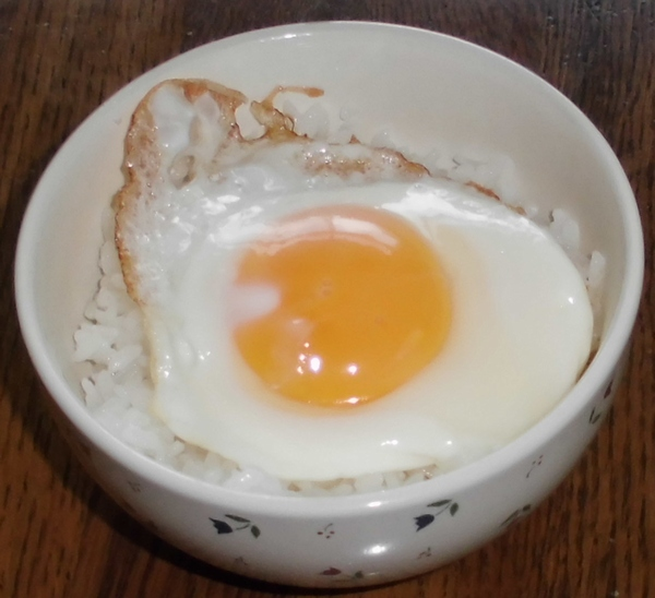 Medamayakidon